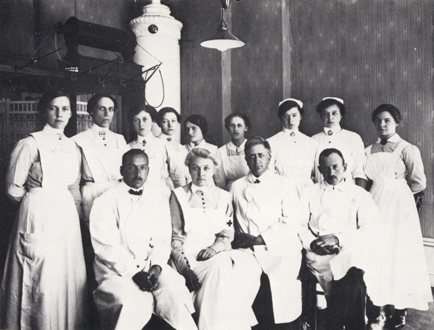 Hela vårdpersonalen vid Radiumhemmet på Scheelegatan, andra från höger i nedre raden är Gösta Forssell